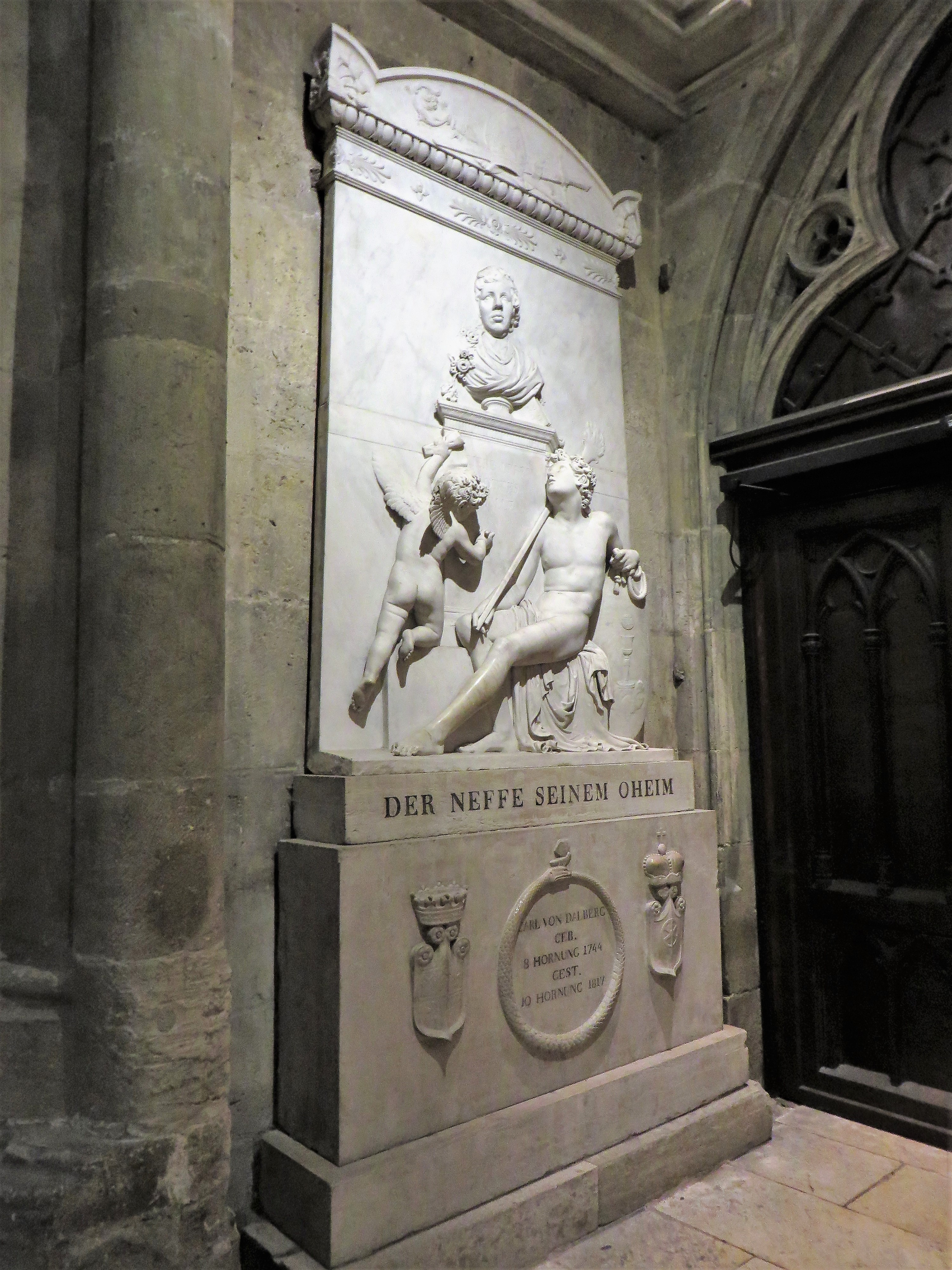 Regensburger Dom vor dem Eingang zum Domschatz. Grabdenkmal für Carl von Dalberg (1744-1817). Inschrift: „Der Neffe seinem Oheim“.